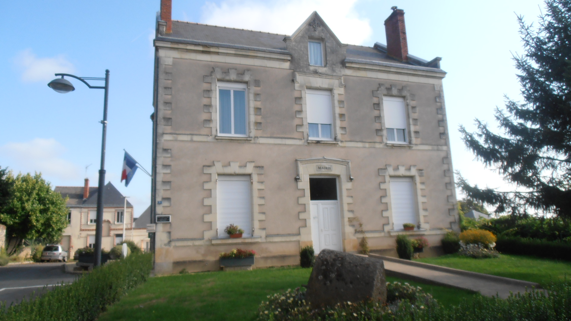 La mairie de St Clément de la Place